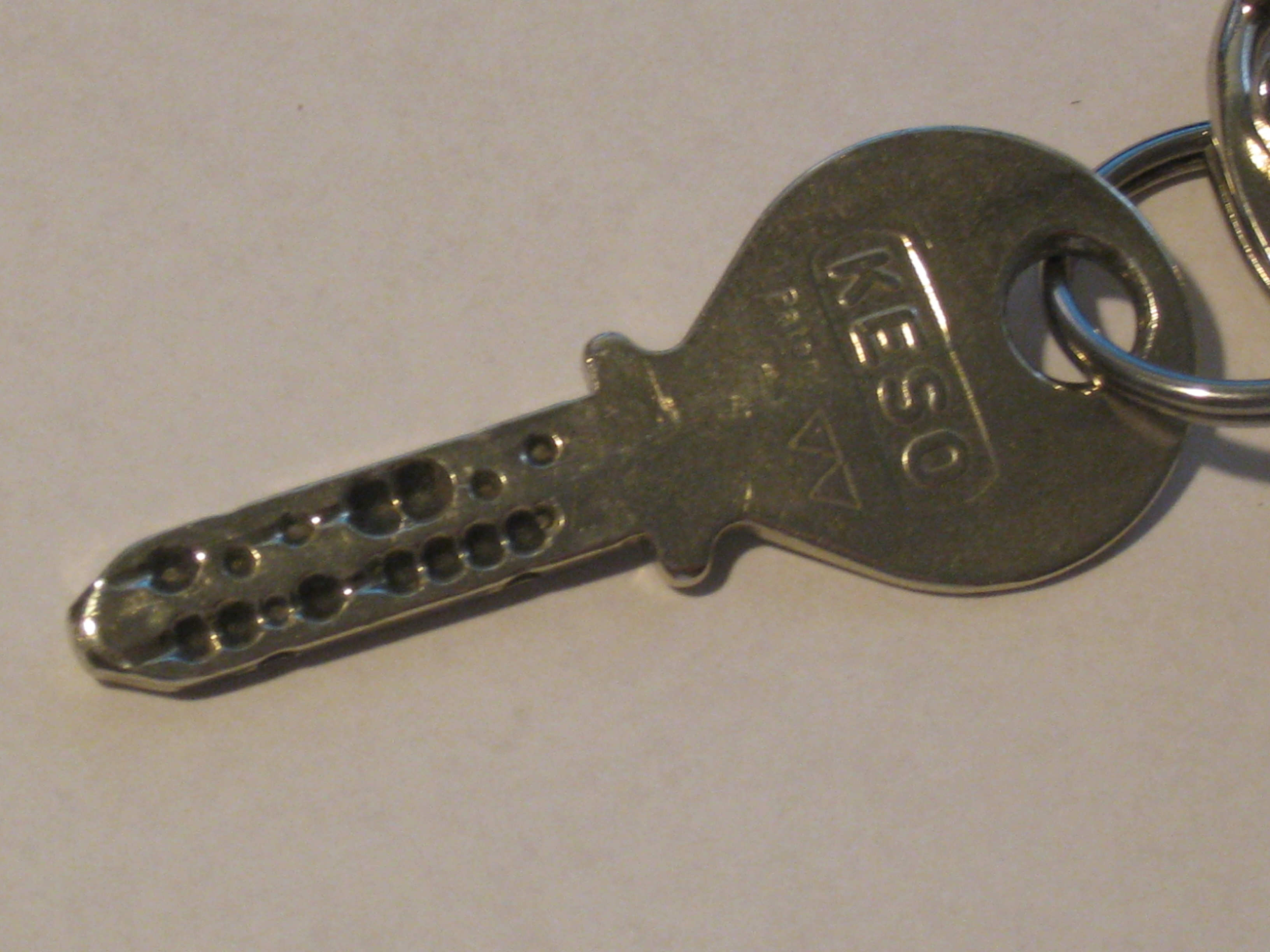 Keso-3000-Schlüssel